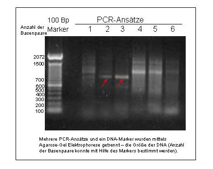 Foto eines 1% Agarose Gel mit mehreren DNA-Proben und einem DNA-Marker (Färbung erfolgte mittels Ethidiumbromid)